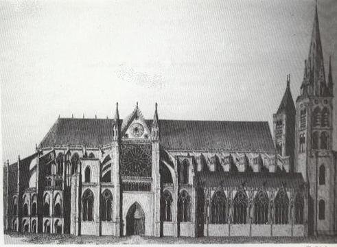 Abbaye de St-Denys, gravure extraite de Plan and Views of The Royal Abbey of Saint-Denys, the Ancient Mausoleum of the Kings of France : Engraved on Six Plates by B. Howlett, from Drawings by Major G. Anderson 1812 Londres.